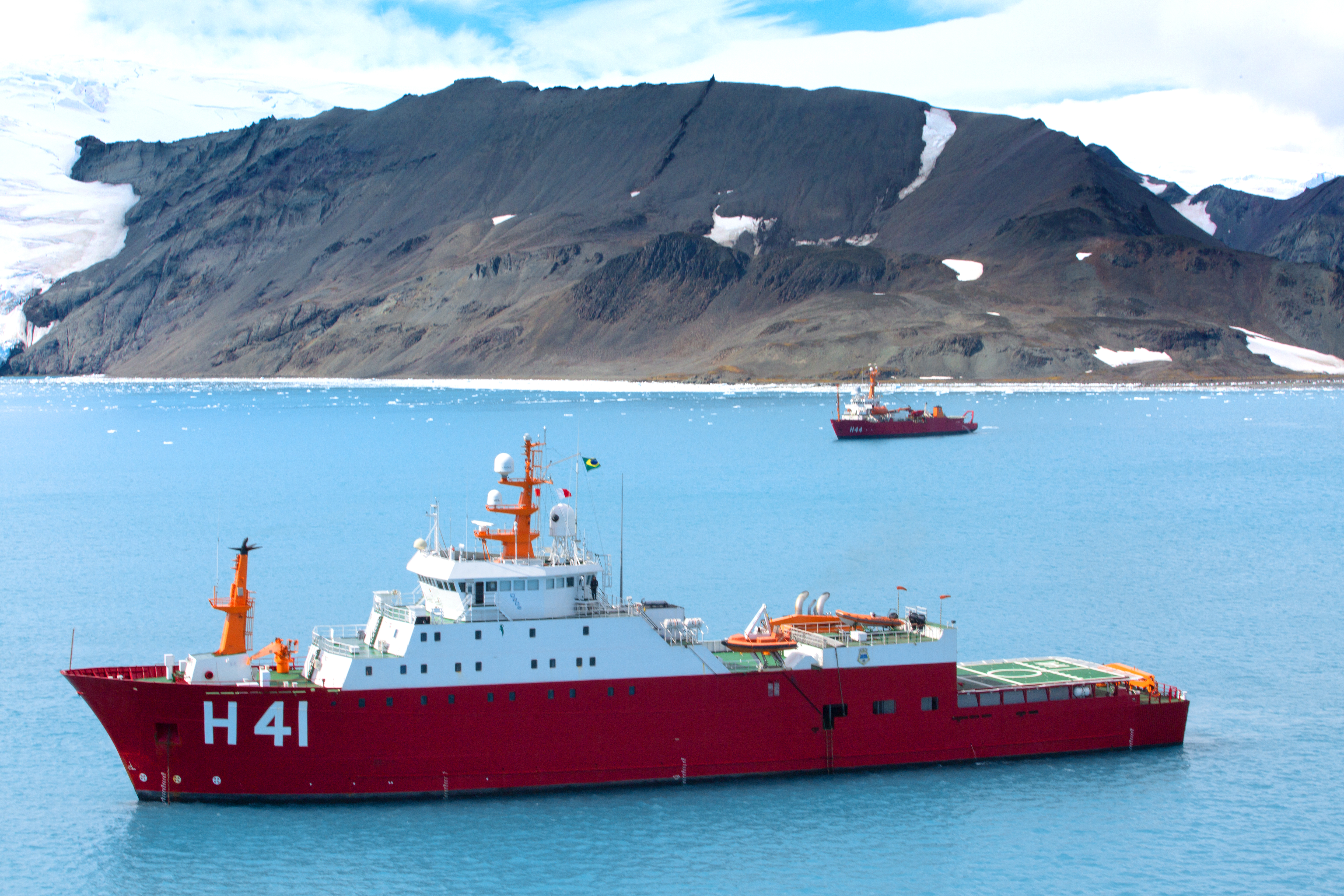 Arquivo liberado pela Marinha do Brasil através de parceria de conteúdo com Wiki Educação Brasil